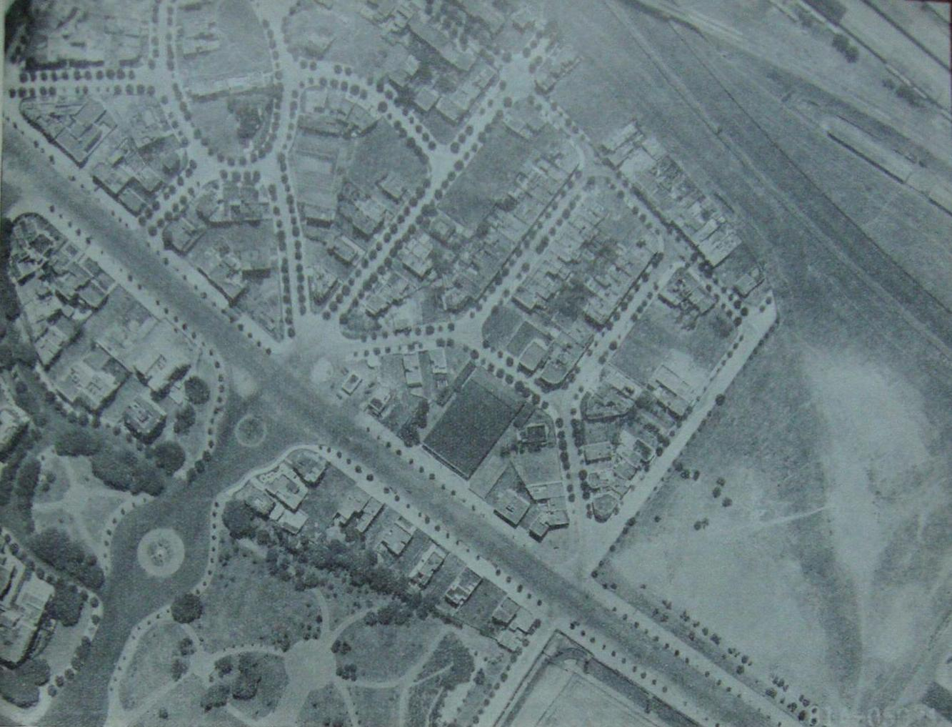 Vista a vuelo de pájaro del Barrio Parque de Palermo Chico. Diseñado por el paisajista Charles Thays (Carlos Thays), se caracteriza por sus calles que rompen la cuadrícula, sus espacios verdes y sus importantes casas de la aristocracia. La avenida que cruza la imagen en diagonal es la Avenida Centenario (hoy Figueroa Alcorta), y al extremo superior derecho están las vías del Ferrocarril Central Argentino (hoy General Mitre). El terreno en la esquina inferior derecha es ocupado desde 1978 por el edificio de Argentina Televisora Color (TV Pública, Canal 7).